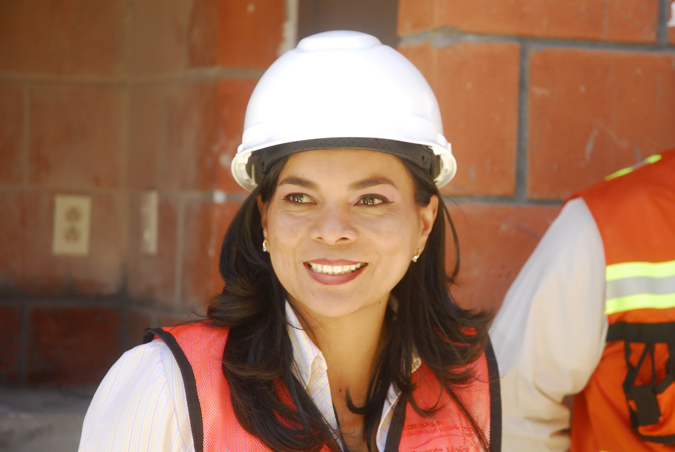 Beatriz Mojica Morga Supervisando